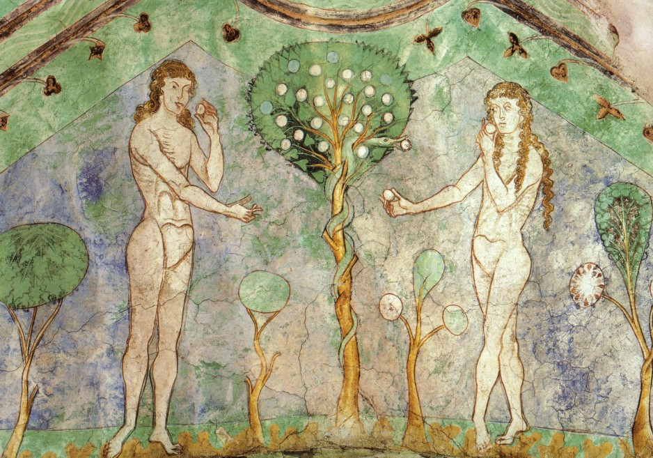 Cathedral of Gurk, Bishop's Chapel, First Sin (?)/Dom zu Gurk, Bischofskapelle, Sündenfall